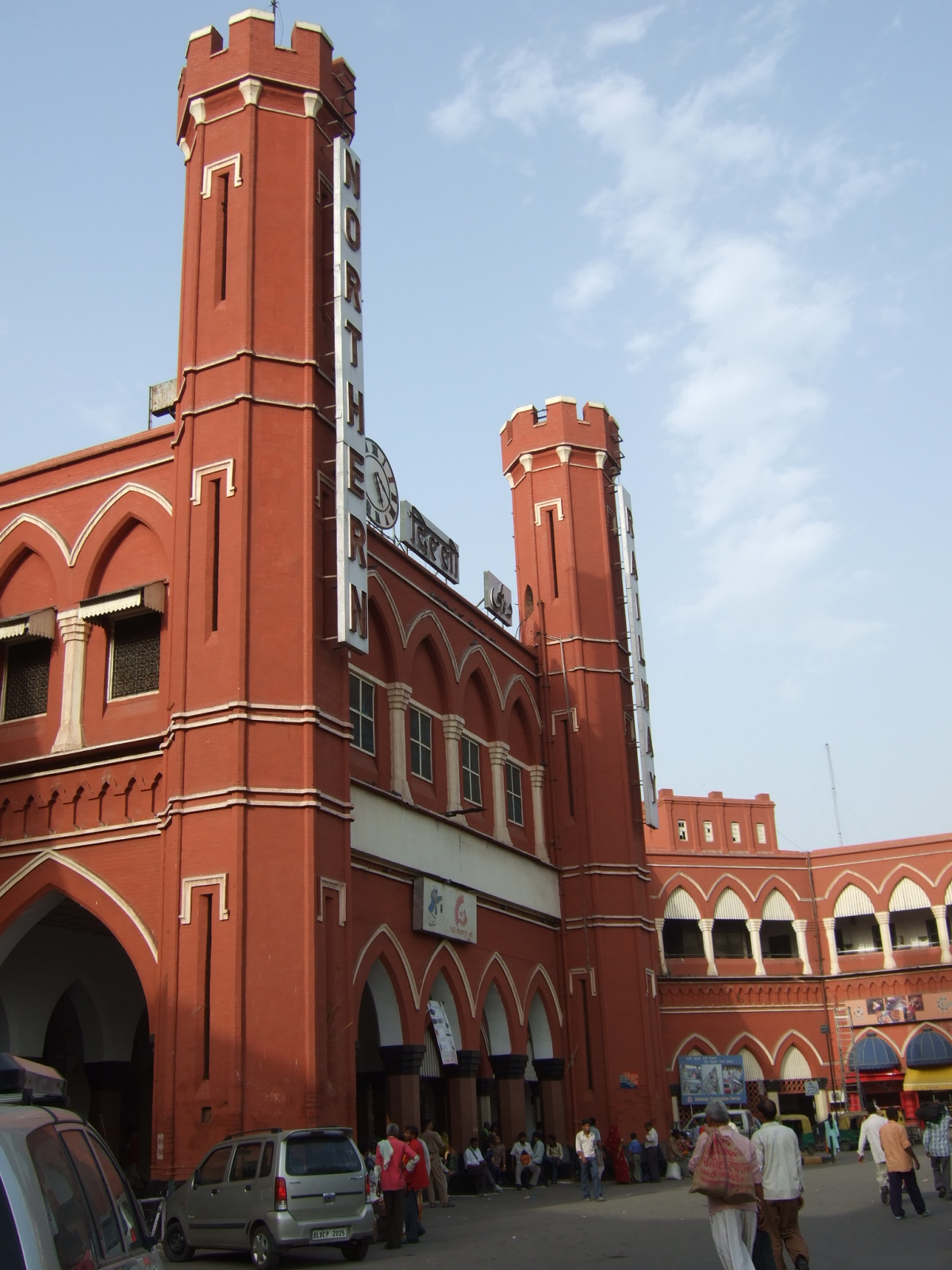 New Delhi